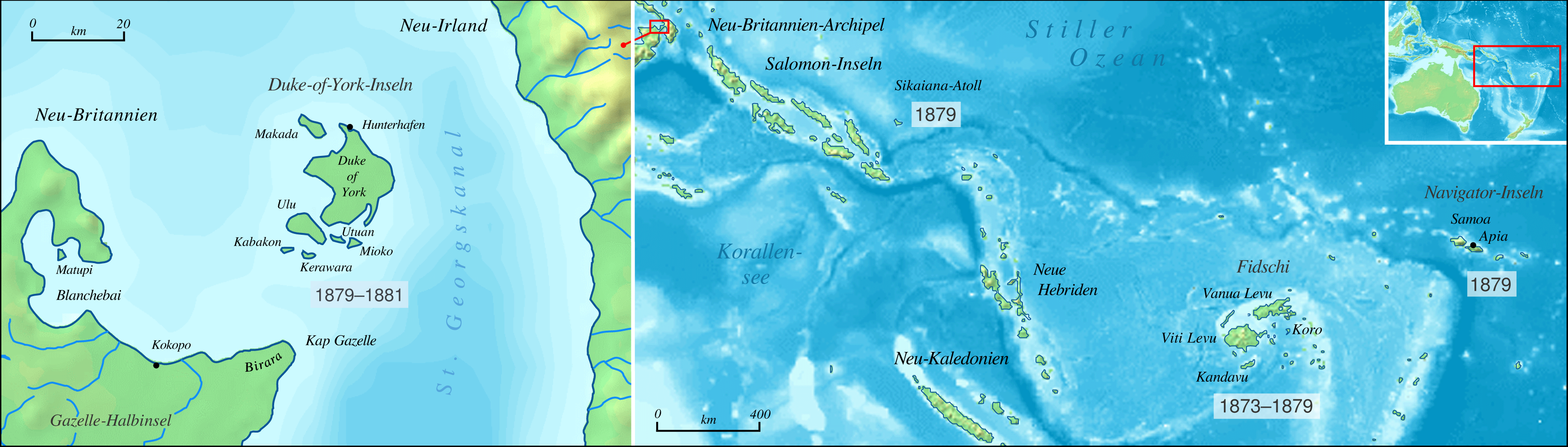 Karte zu den Forschungsaufenthalten Theodor Kleinschmidts in Ozeanien, 1873–1881, zeitgenössische Benennungen